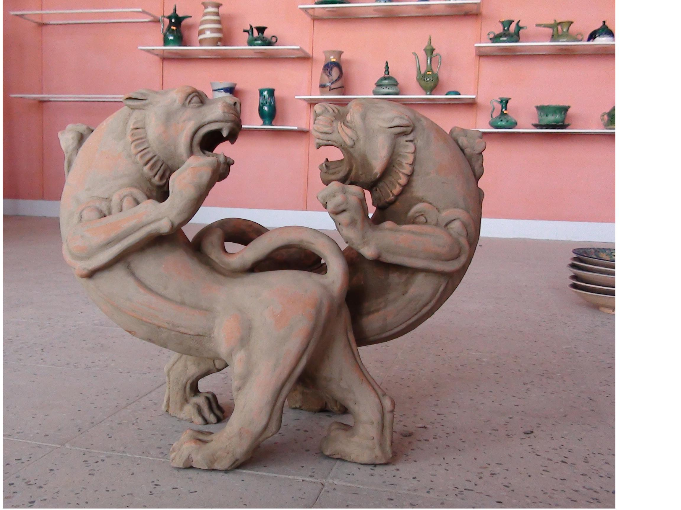 مجسمه سفالين دو شير اثر استاد محمود صفری‌روشن